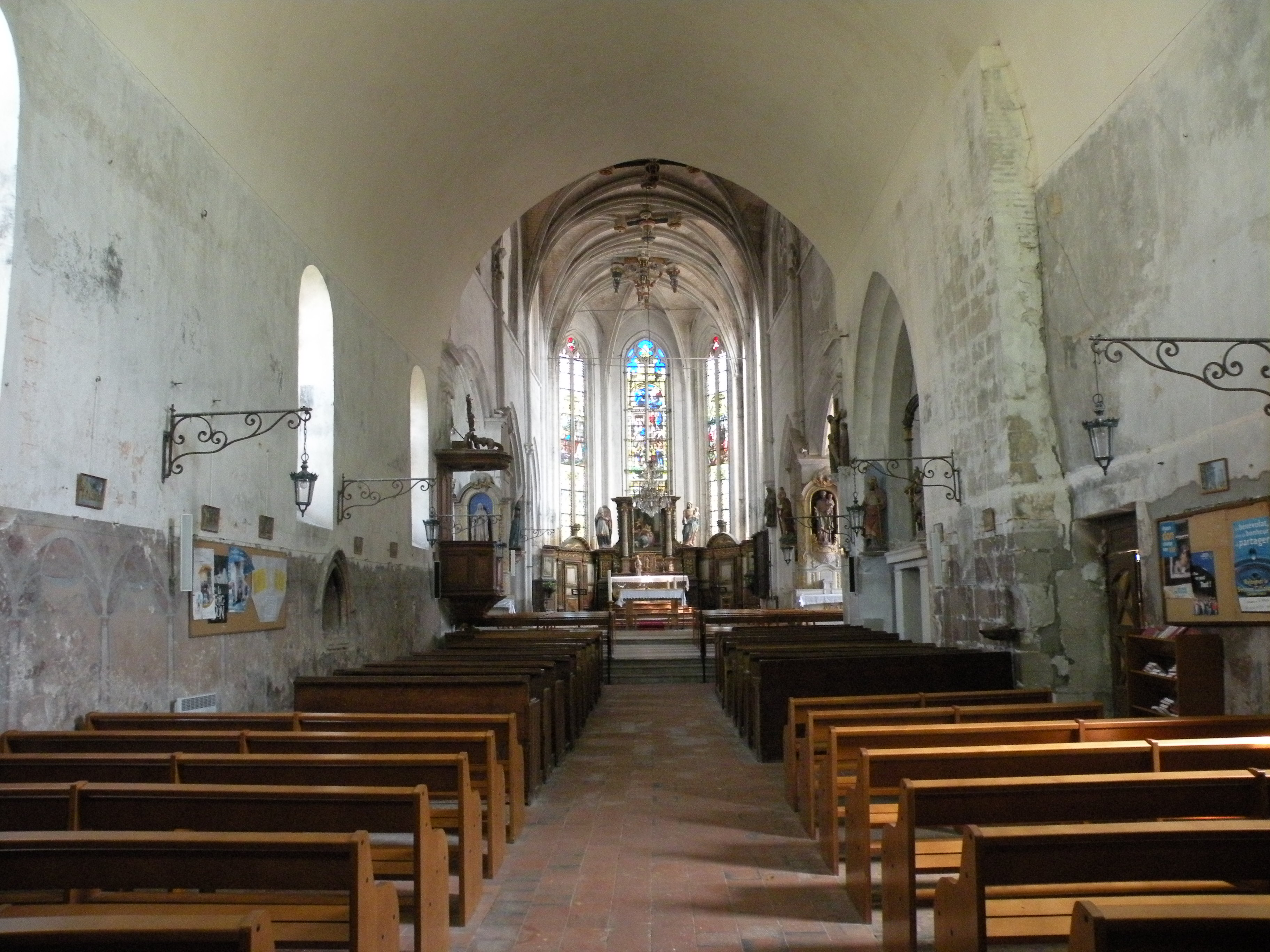 Église Saint-Denis de Sérifontaine prolongement de la nef